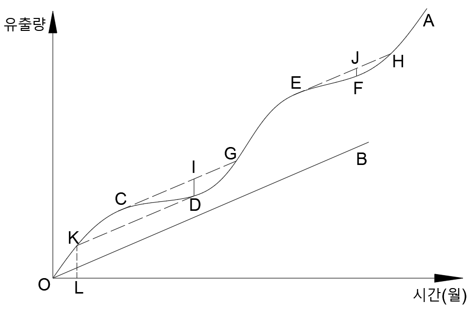 저수지 취수량 결정방법(Ripple의 방법). OA는 하천 유출량 누가곡선, OB는 계획 취수량 누가직선이다